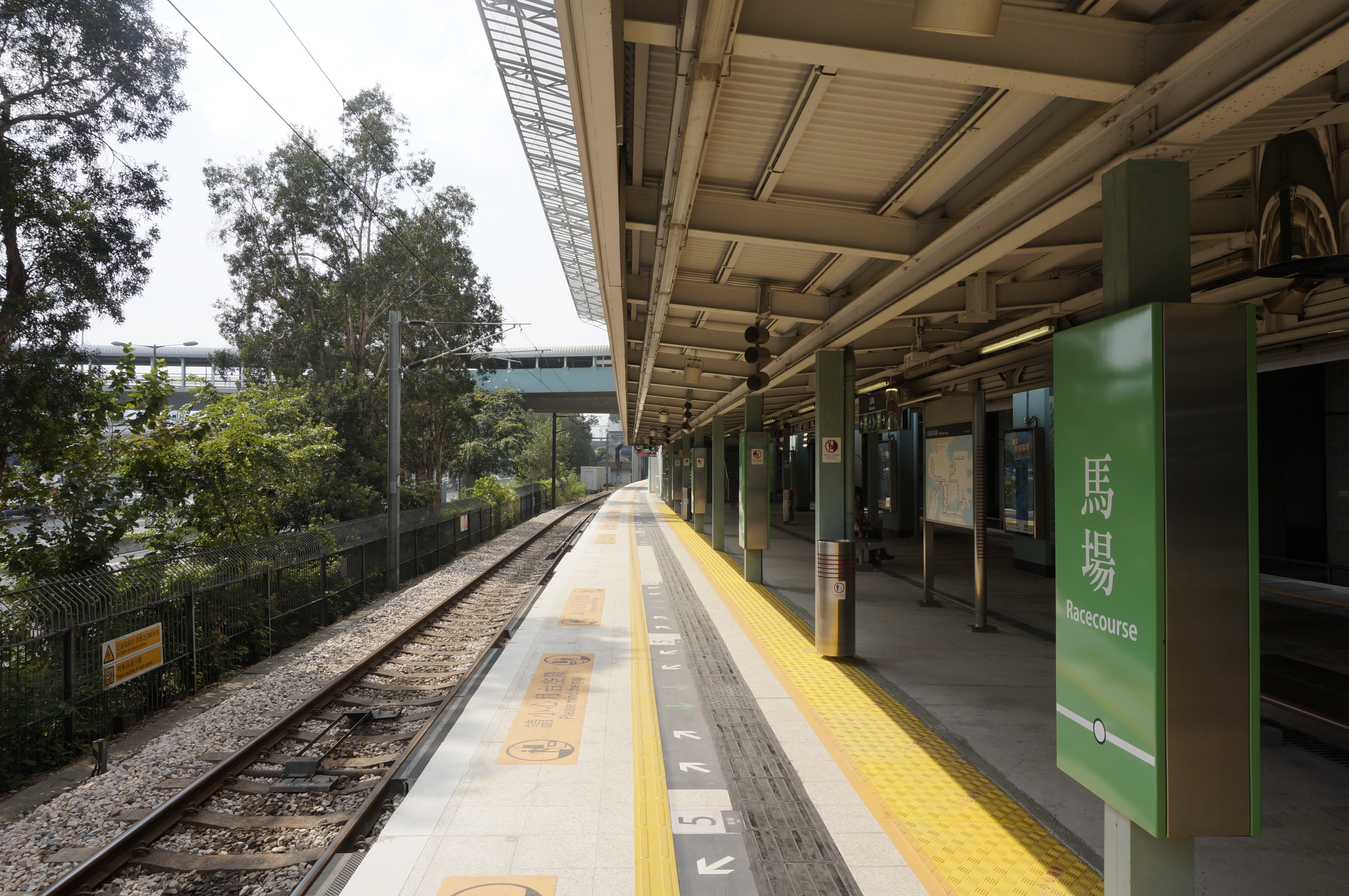 港鐵馬場站月台